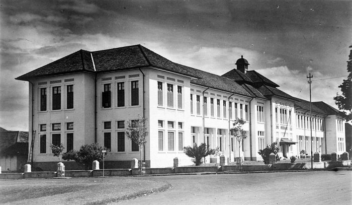 Repronegatief. H.B.S. te Bandung, Java